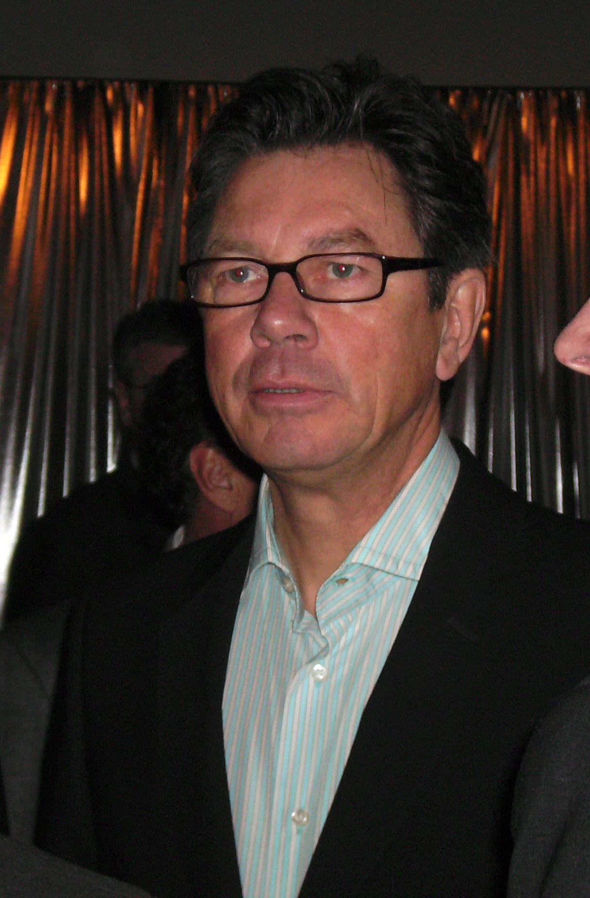 Portrait Peter Jacoby